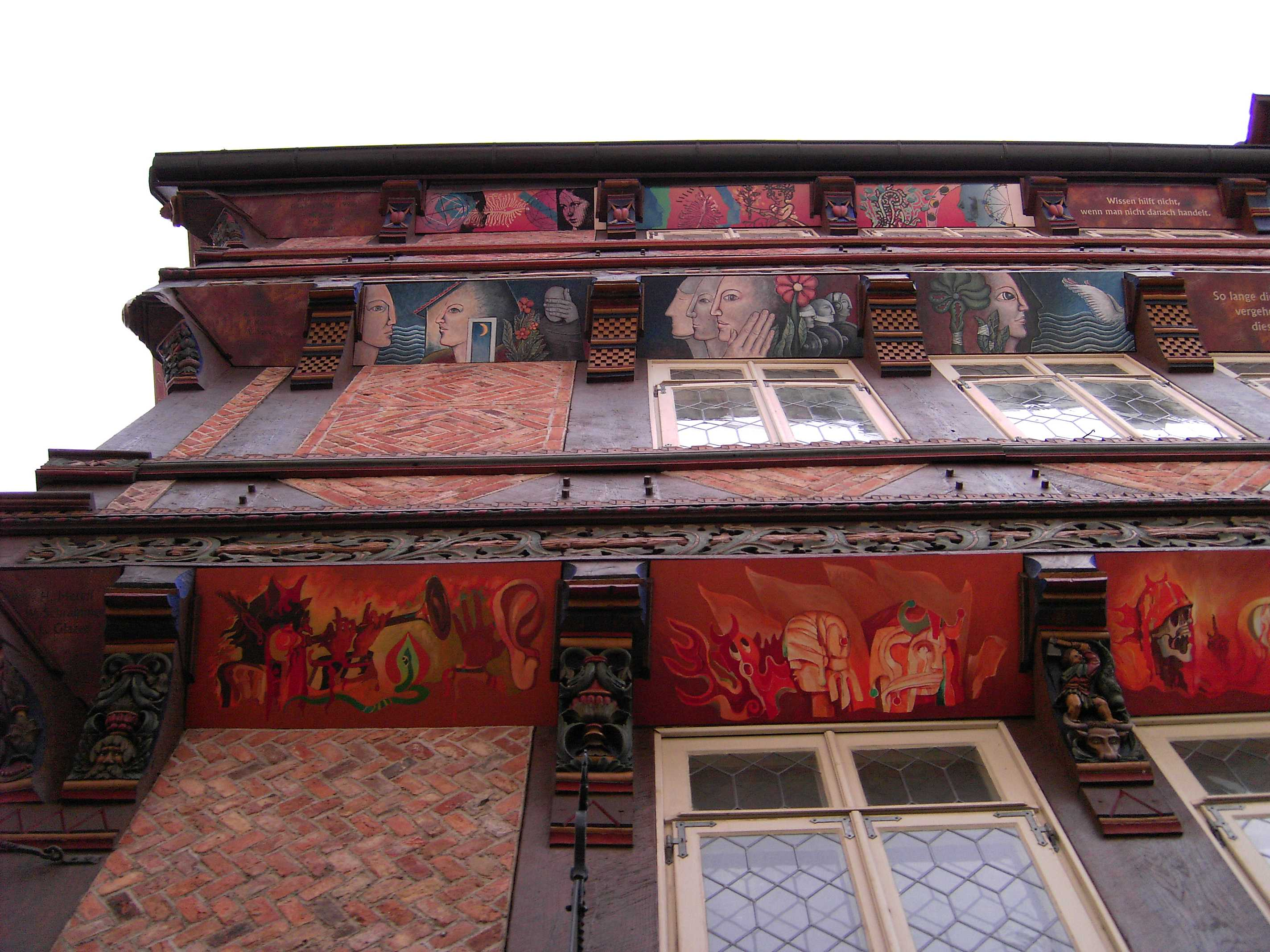 Hildesheim, Knochenhaueramtshaus, Side, Detail